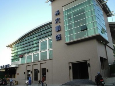 中文（台灣）: 雲林縣斗六火車站。